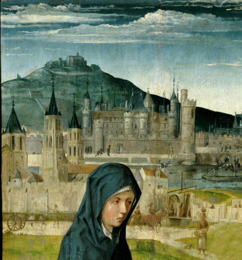 Pietà of Saint-Germain-des-Prés arrière plan Montmartre Unknown Master, German (active around 1500 in Paris)